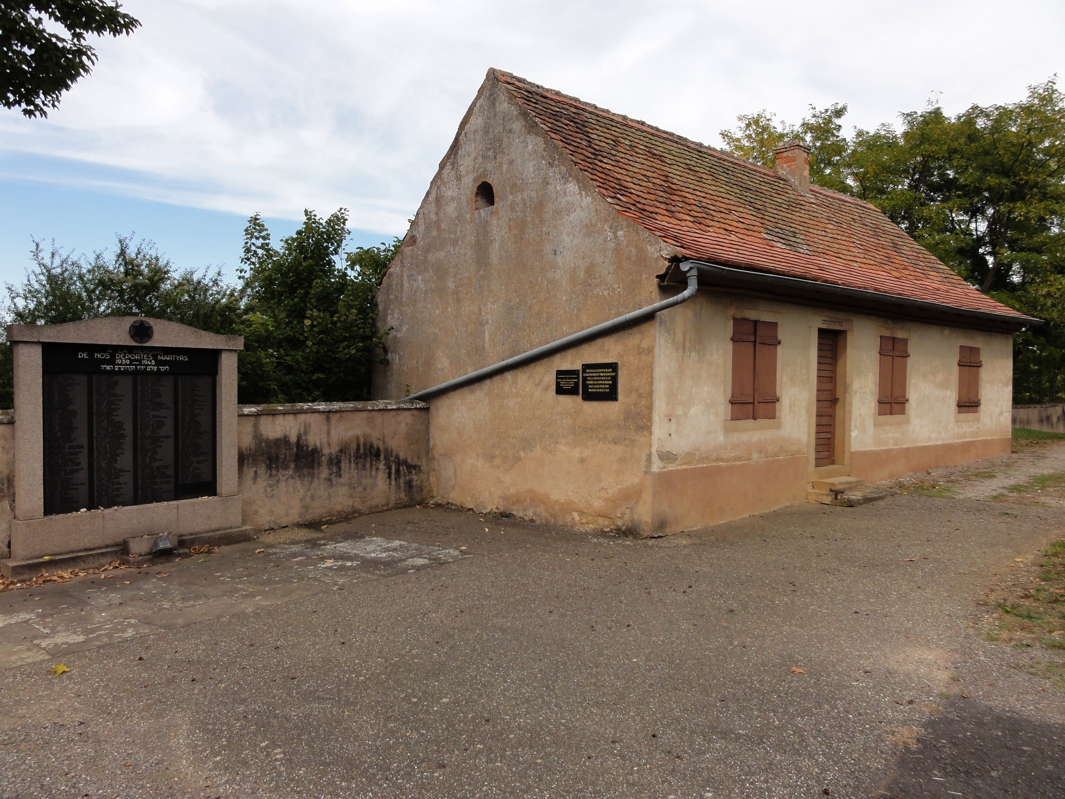 Alsace, Bas-Rhin, Rosenwiller, Cimetière juif (PA00135148, IA00075623): Maison des Morts.